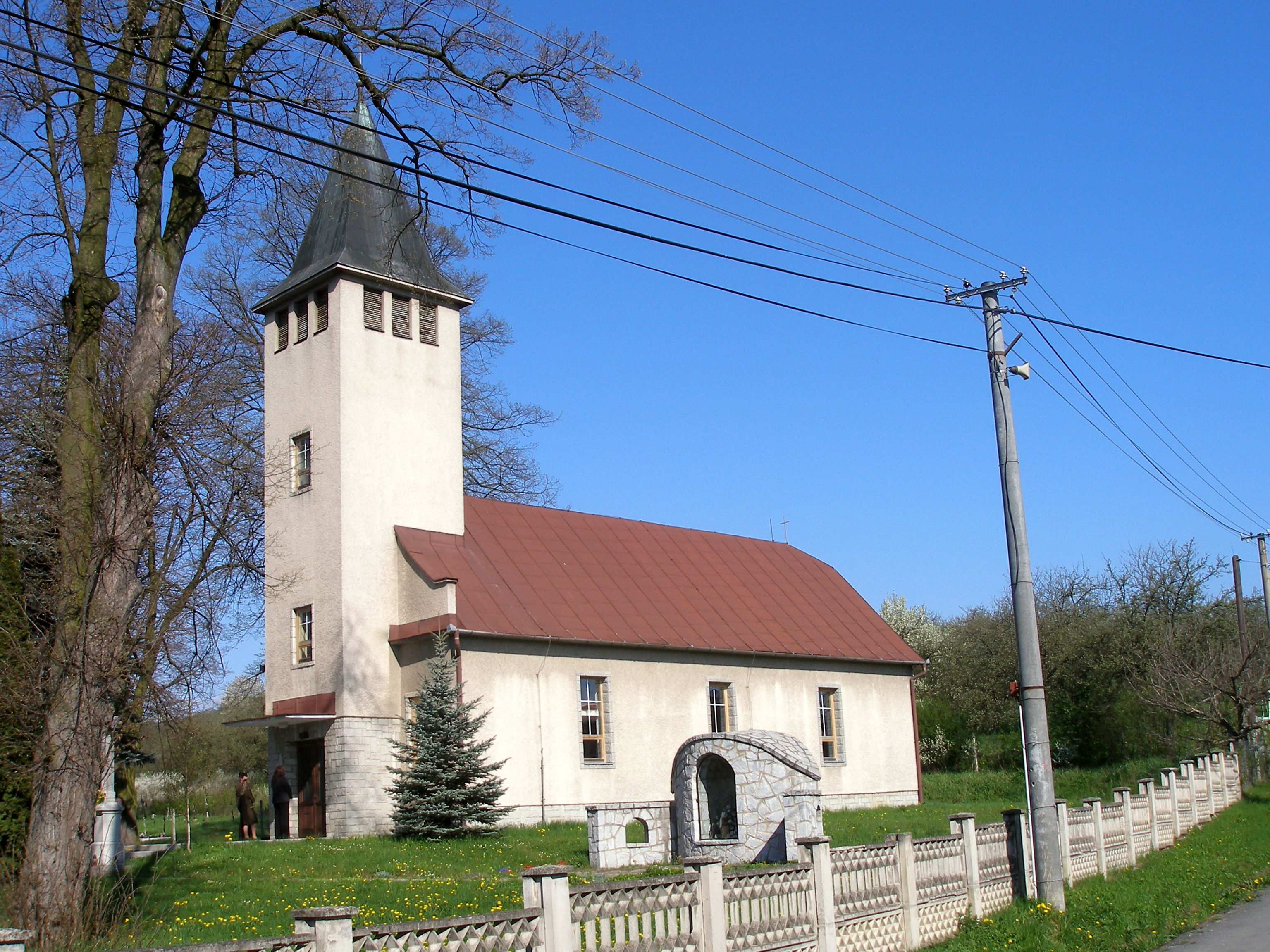 Obec Nemcovce okres Prešov región Šariš